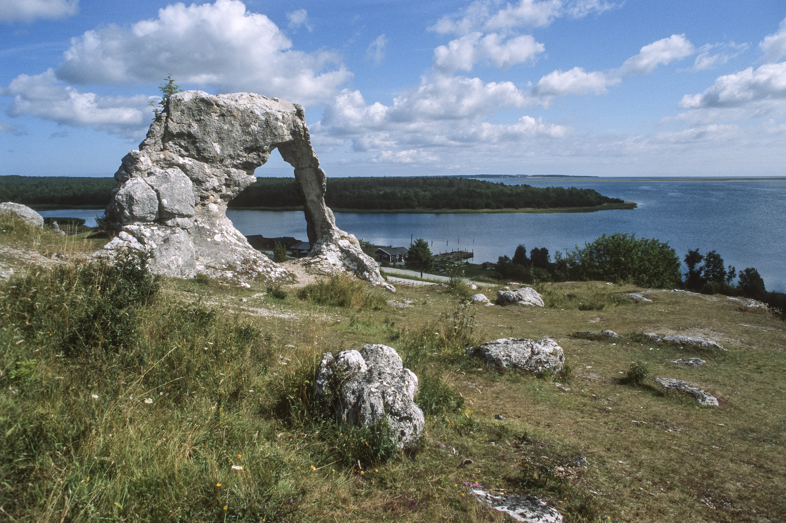 Lergrav rauk